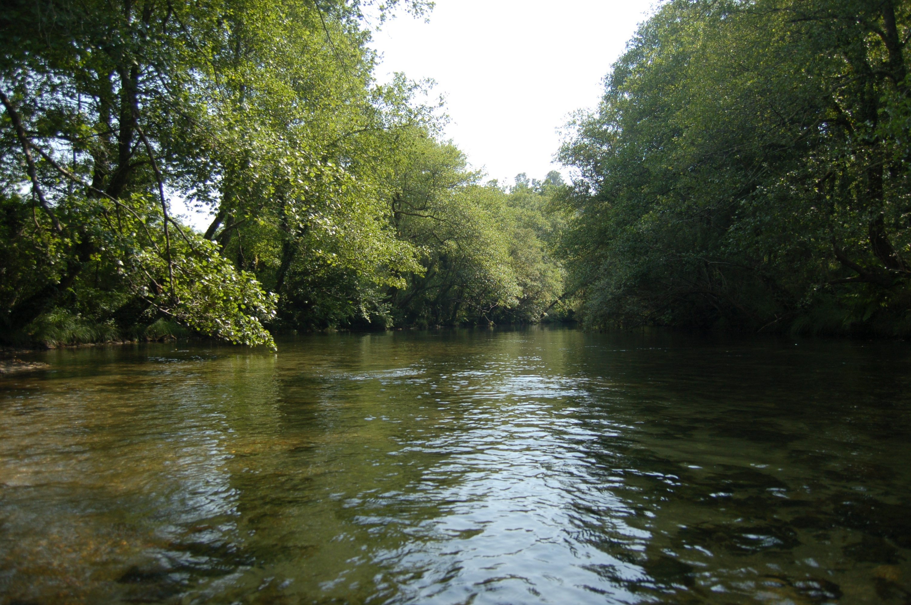 Río Tea á altura de Cernadela, na parroquia de Riofrío (Mondariz)